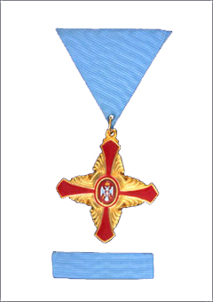 Srpski (latinica): Orden Krst milosrdja